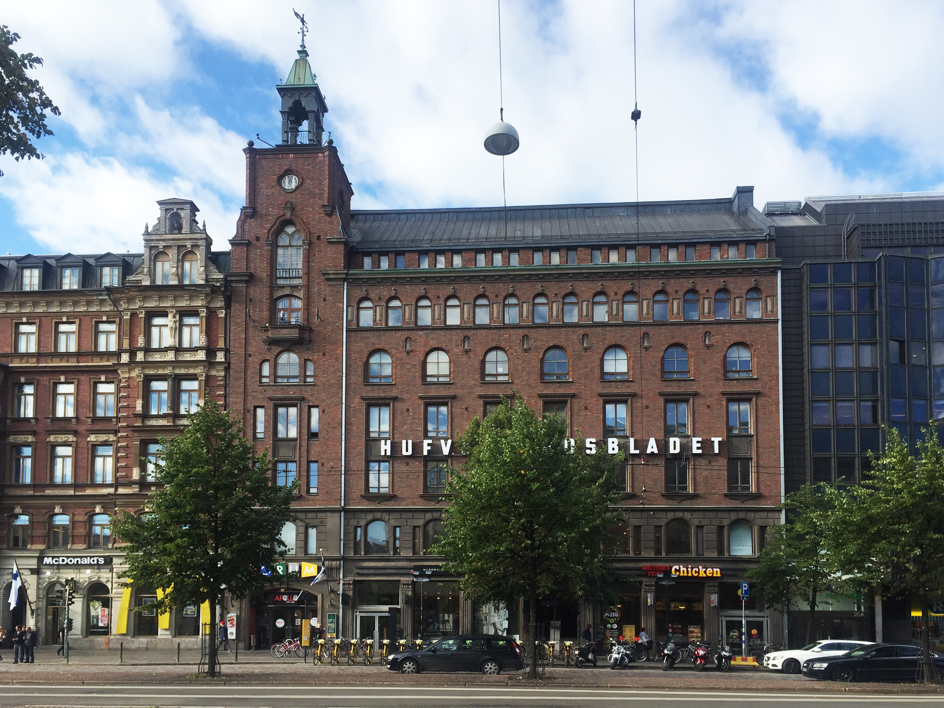 Hufvudstadsbladet, Mannerheimsvägen 18 i Helsingfors. Buggnadsår 1923. Arkitekt Wäinö Gustaf Palmqvist